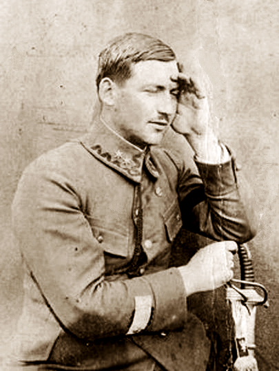 Kpt. Włodzimierz Maxymowicz-Raczyński w czasie służby w Legionach Polskich.